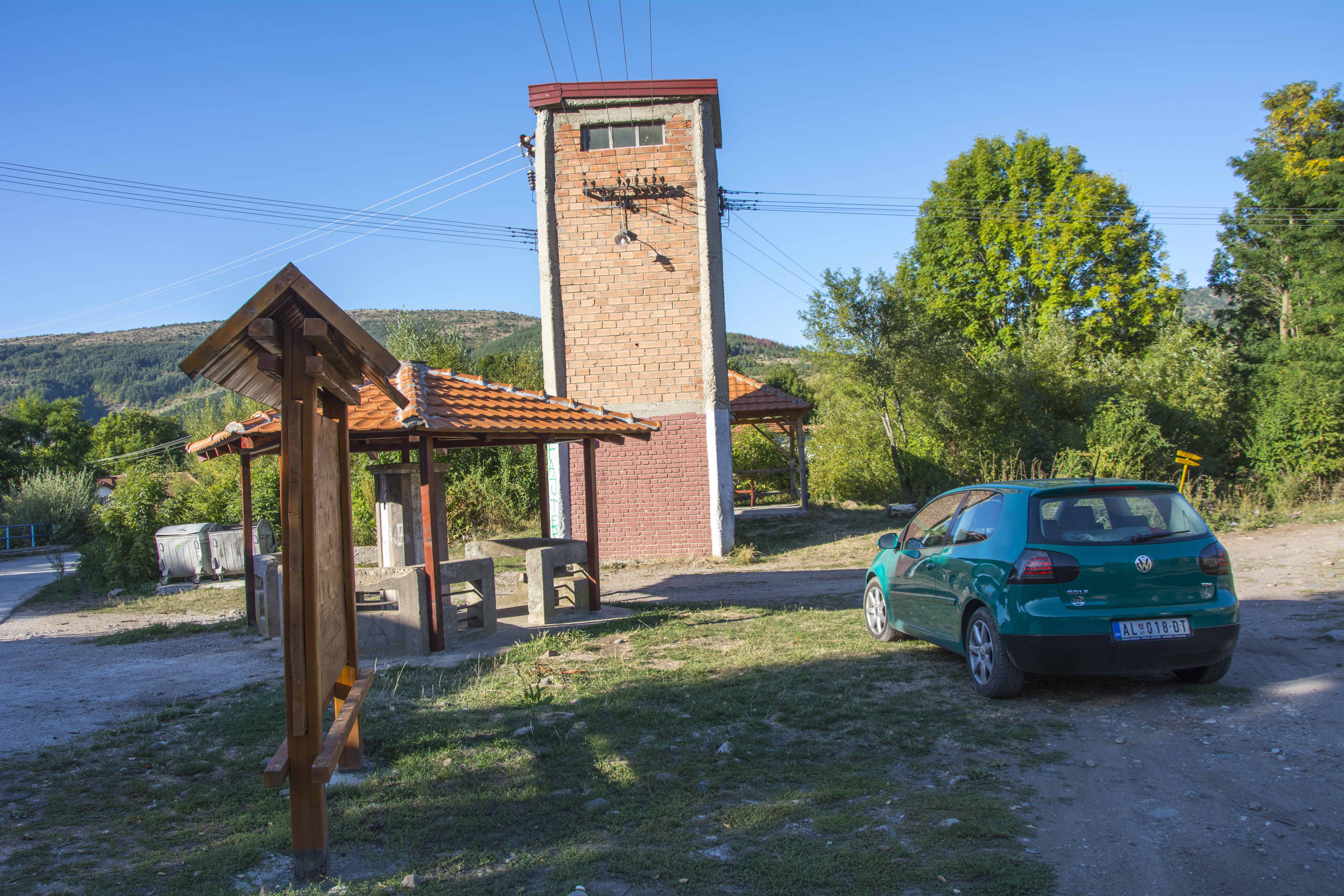 Село Славиња, центар